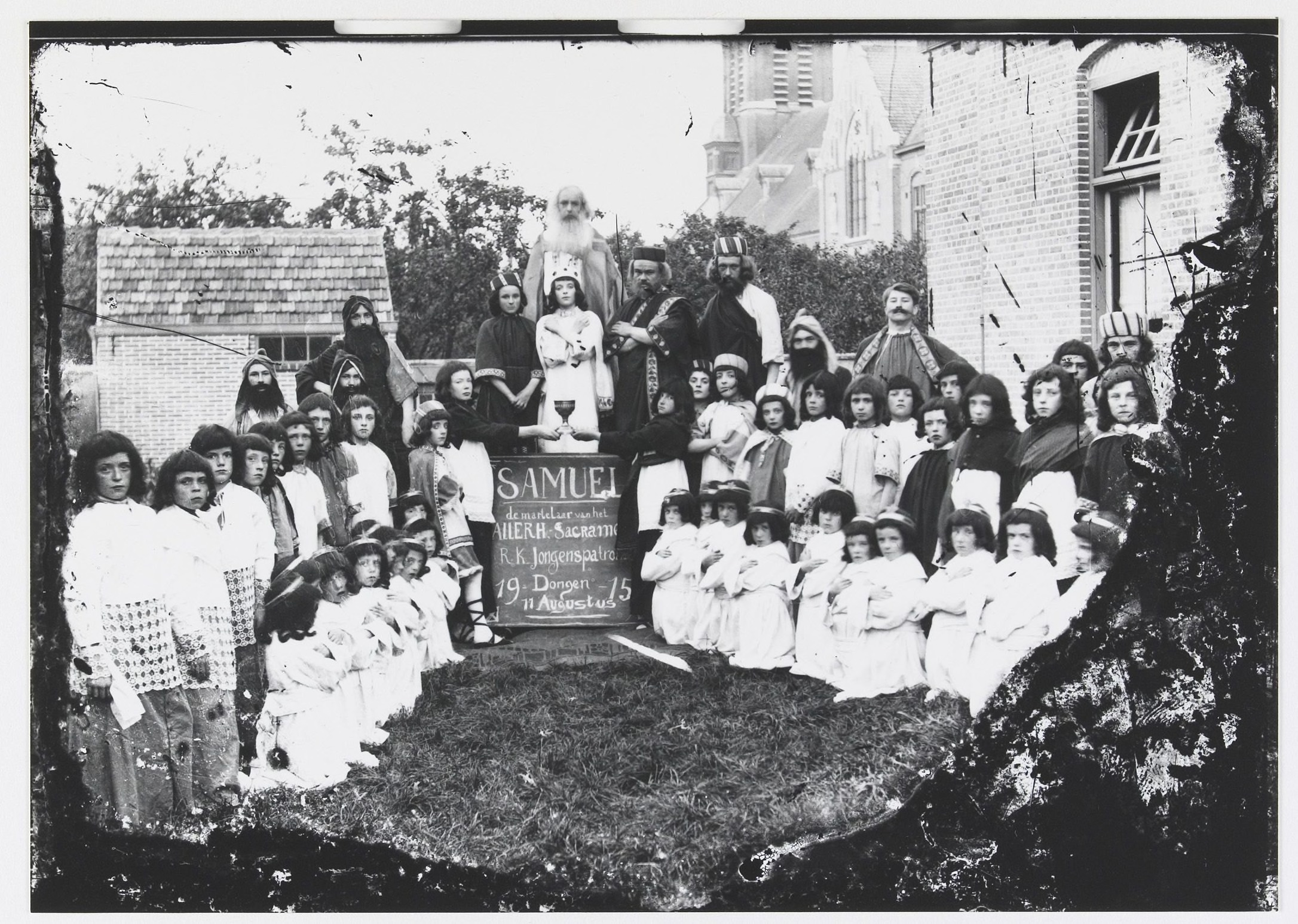 De cast van het toneelstuk "Samuel, de martelaar van het Allerheiligst Sacrament", bestaande uit leden van het R.K. Jongenspatronaat te Dongen